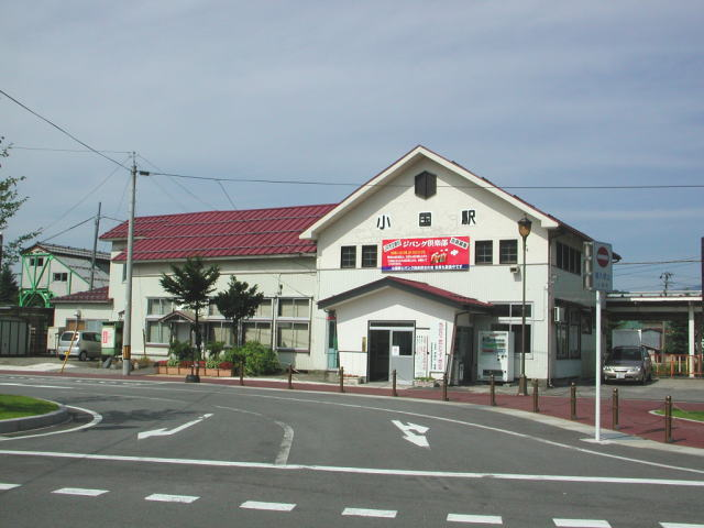 JR小国駅